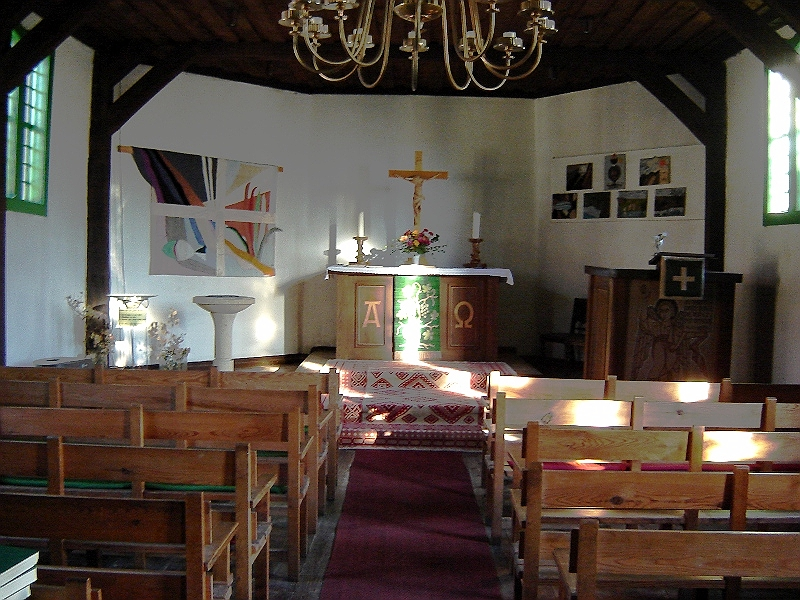 Innenansicht der Martin-Gallus-Kirche in Magdeburg